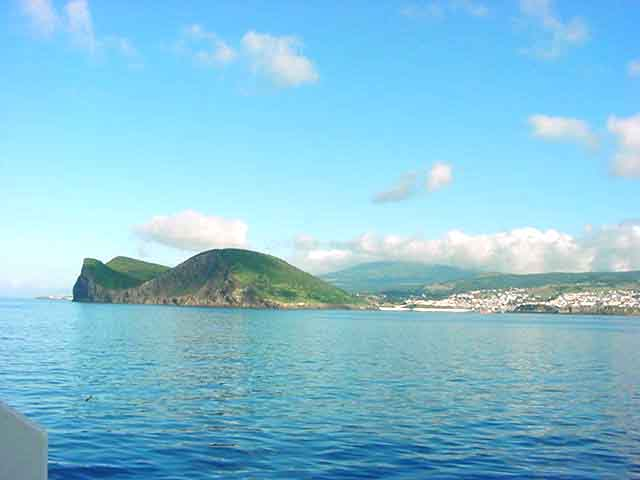 Monte Brasil, visto do mar, Ilha Terceira, Açores, Portugal.